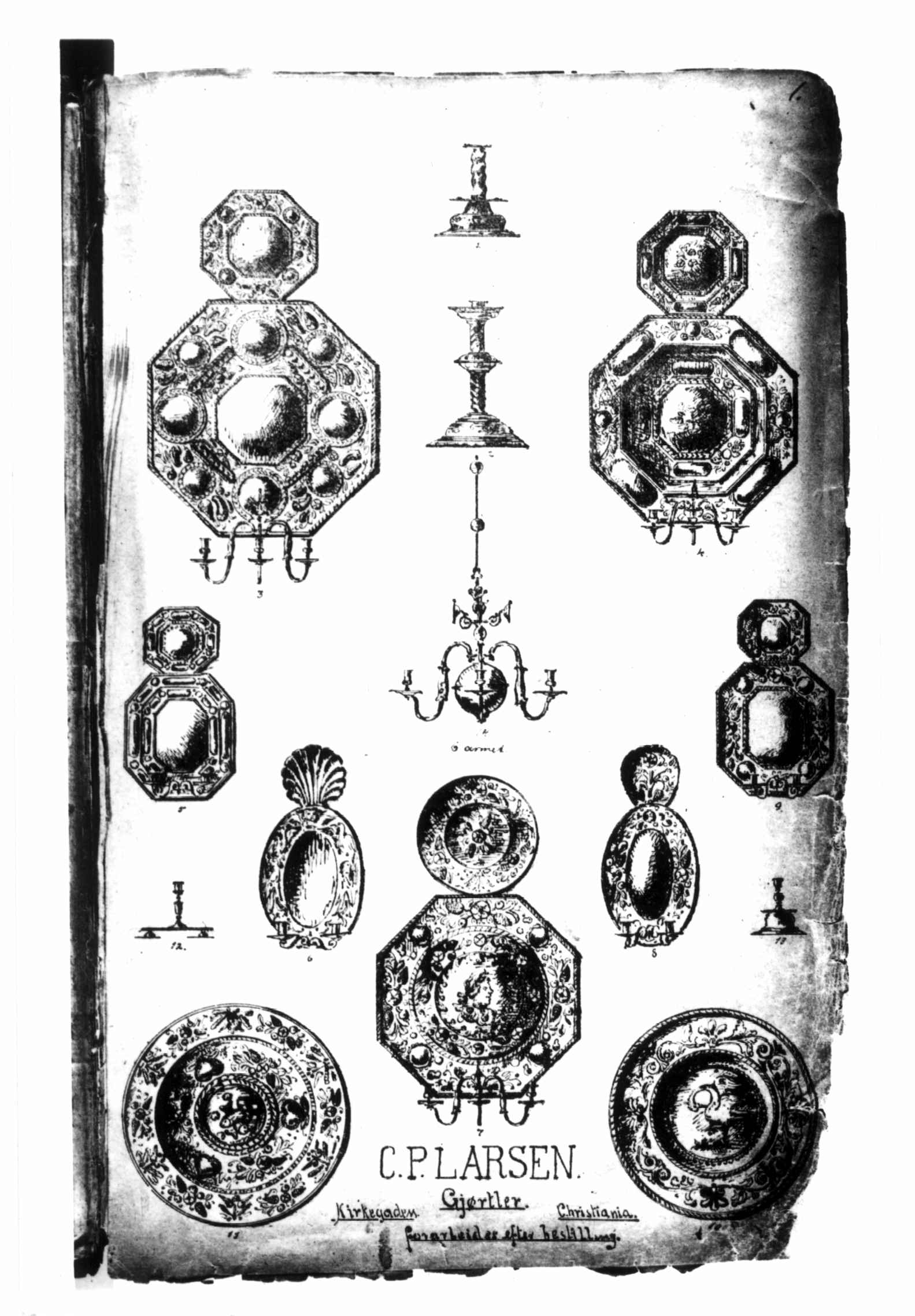 Første side av en varekatalog fra C. P. Larsen utgitt i 1880-årene. Katalogen inneholder mest drevne lampetter, lysestaker og fat, og mye av denne produksjonen ble solgt til Danmark. Foto Norsk Folkemuseum.